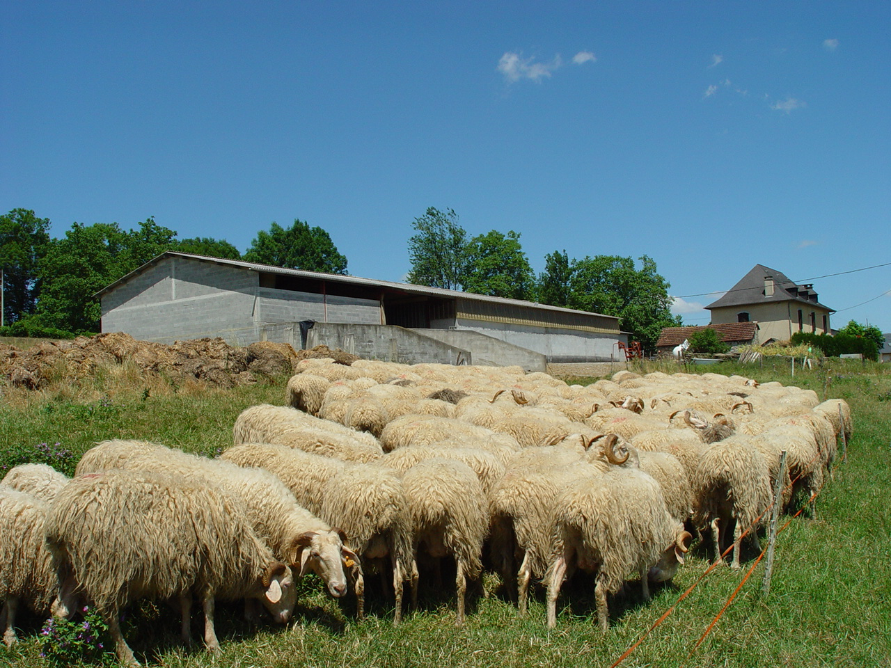 Troupeau de brebis basco béarnaises, photographie prise près d'Arudy (Pyrénées Atlantiques)